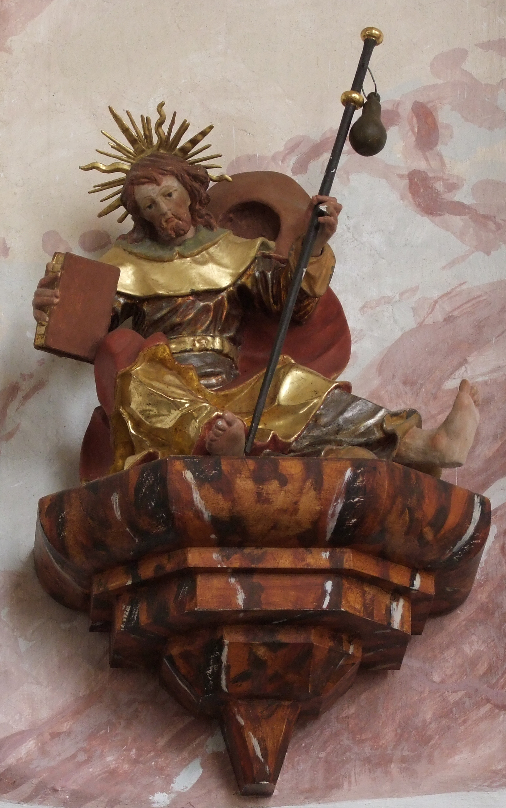 Wallfahrtskirche "Unserer lieben Frau vom Berge Karmel" im oberschwäbischen Mussenhausen, Gemeindeteil Markt Rettenbachs bei Memmingen. Heiliger Jakobus im Chorraum.